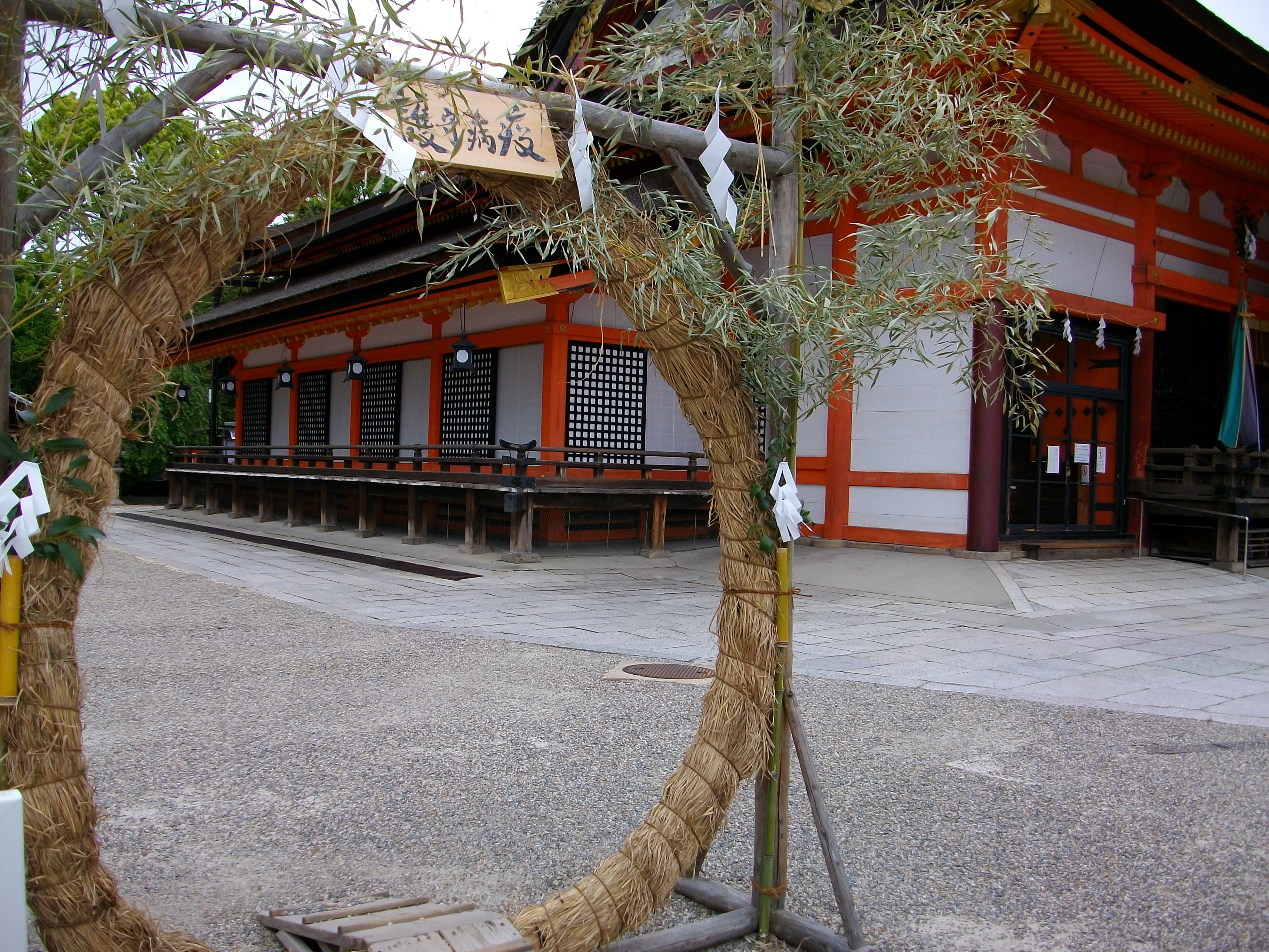 新型コロナウイルス退散祈願のために特設された八坂神社の茅の輪